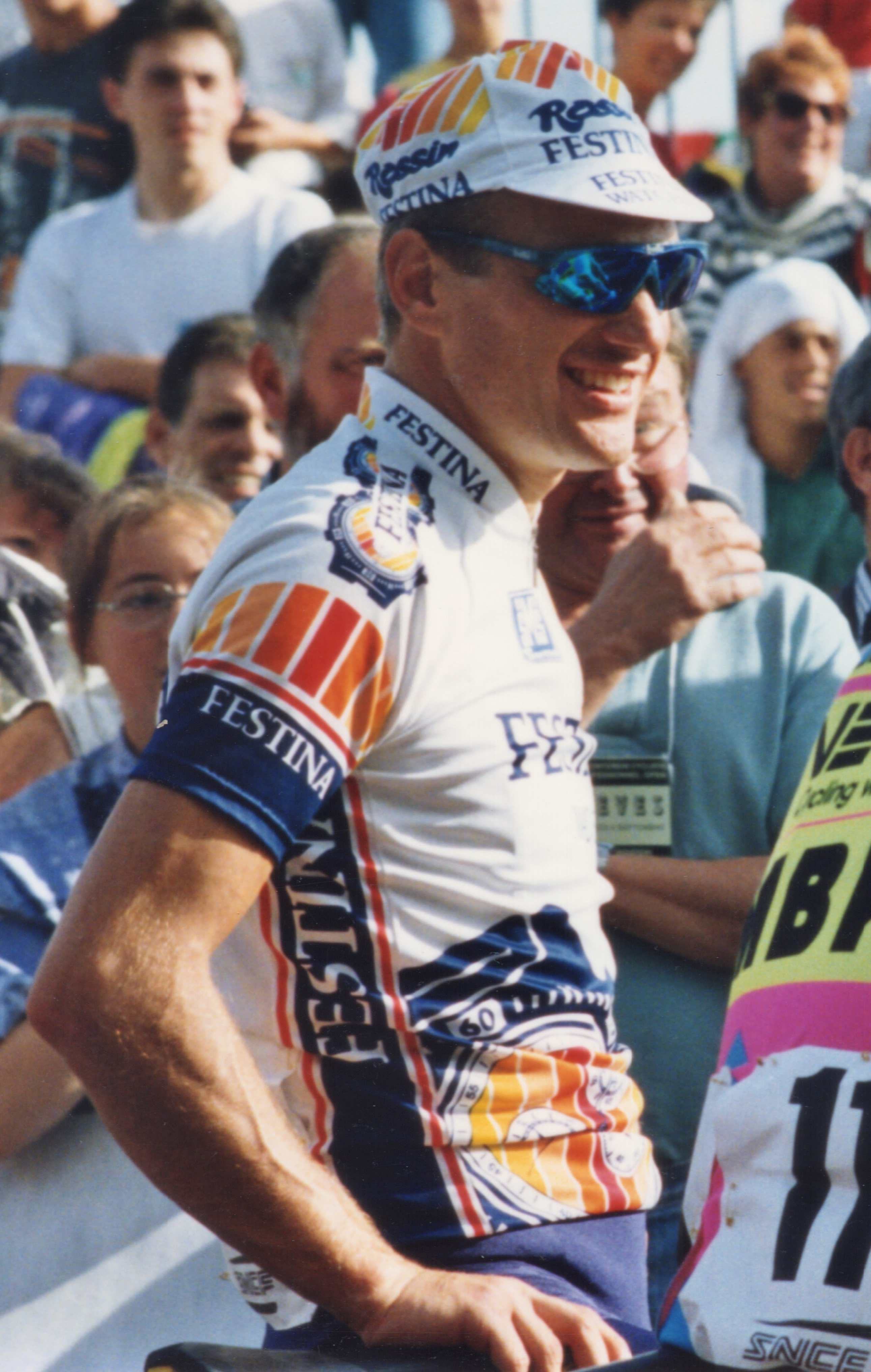 Thierry Marie et René Foucachon au Critérium de Lèves 1993